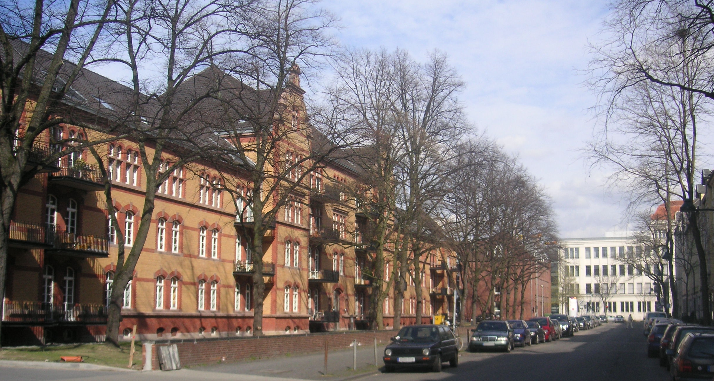 Düsseldorf-Derendorf, Tannenstraße 52–56